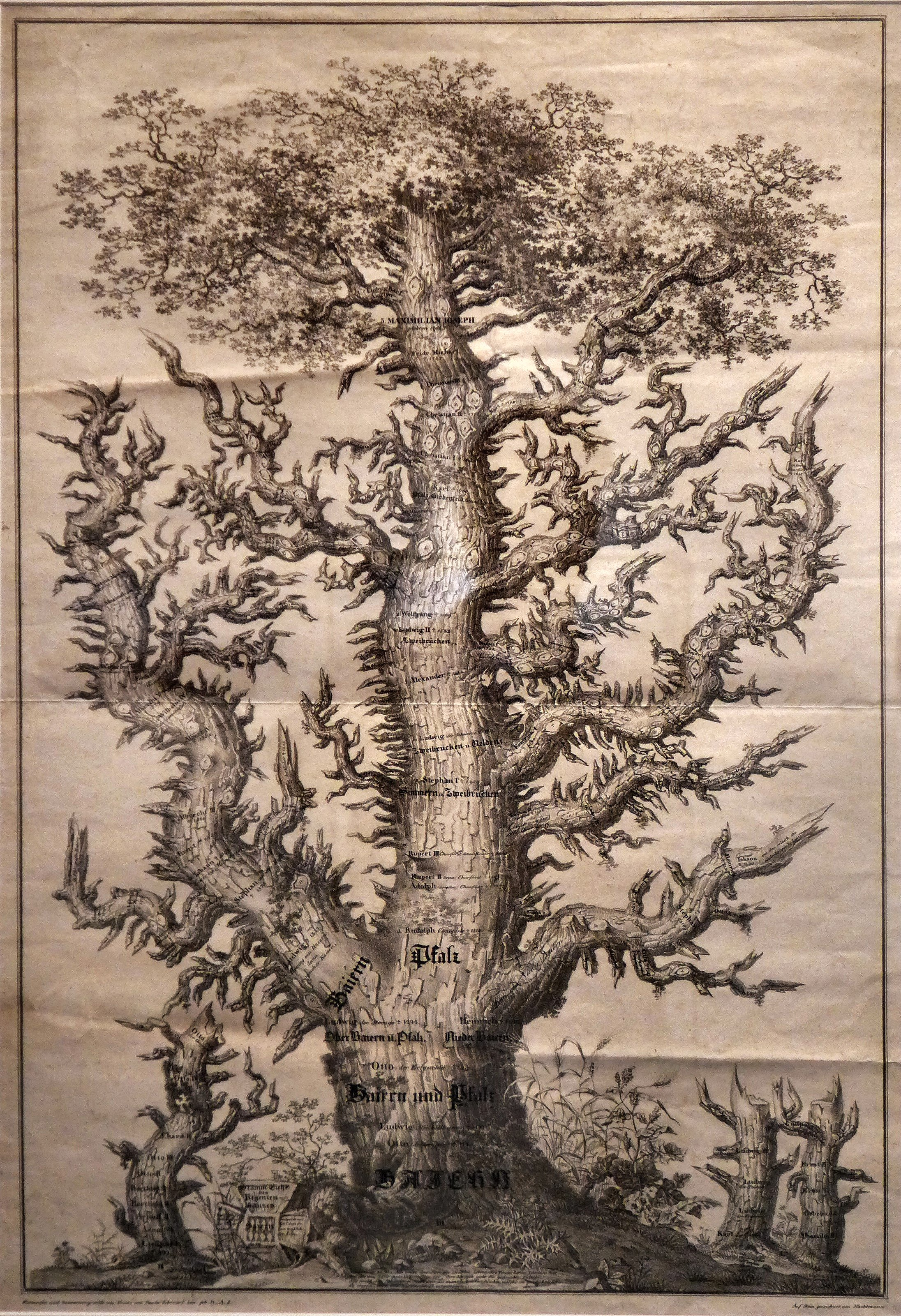 Stamm-Eiche des Regentenhauses Bayern, Die Eiche symbolisiert das Aussterben aller Familienzweige der Dynastie Wittelsbach und die Machtübernahme der pfälzischen Linie, Lithographie von Nachtmann nach Entwurf von Schraml, um 1825, 88 x 62 cm, Stadtmuseum Zweibrücken, Nr. 743.